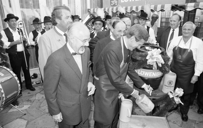 13.9.1990 Oktoberfest in der bayerischen Landesvertretung